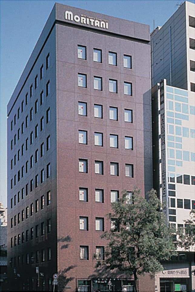 株式会社守谷商会 東京本社ビル（東京都中央区八重洲１－４－２２）